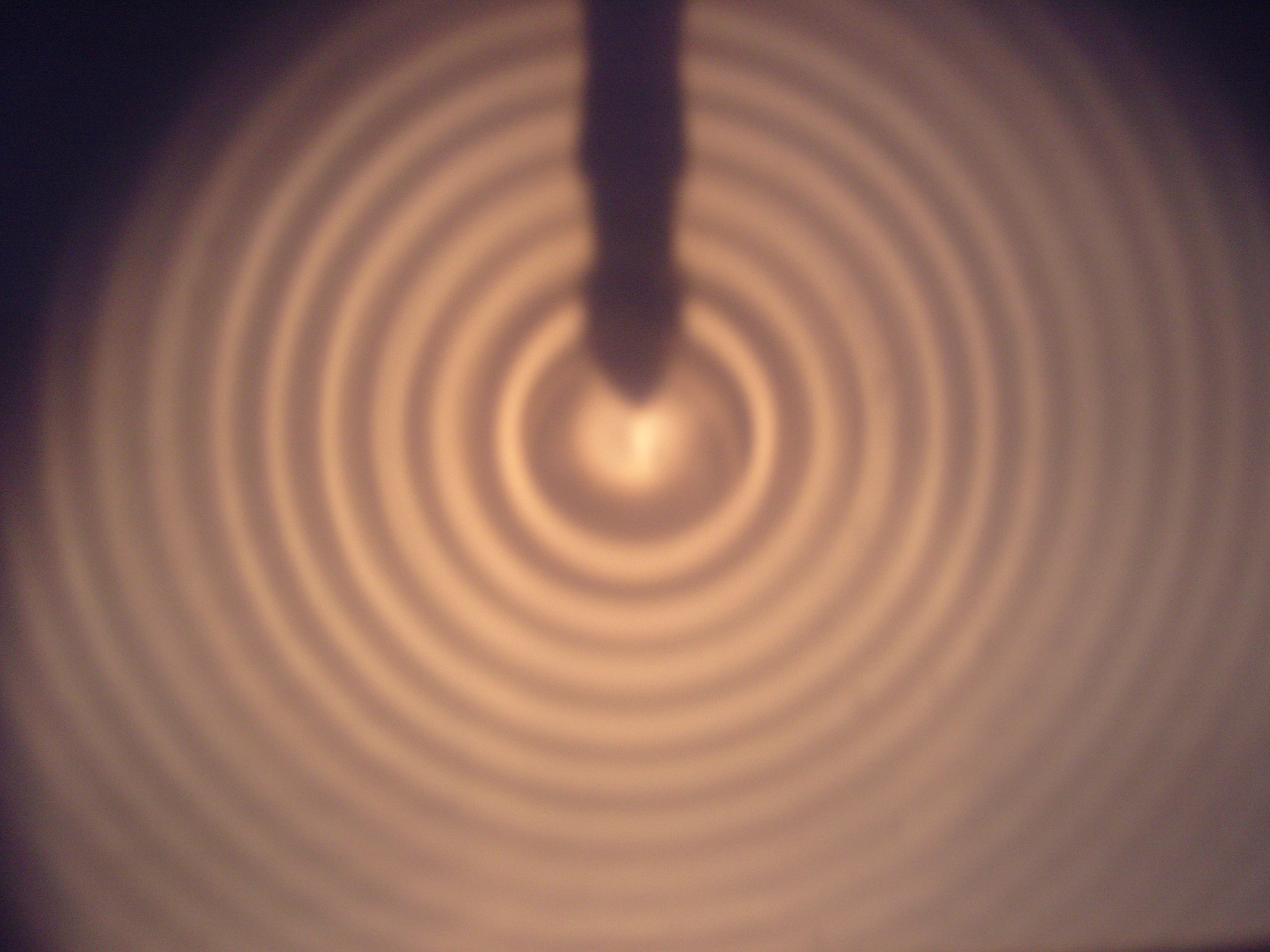 Ones circulars en una cubeta d'ones.